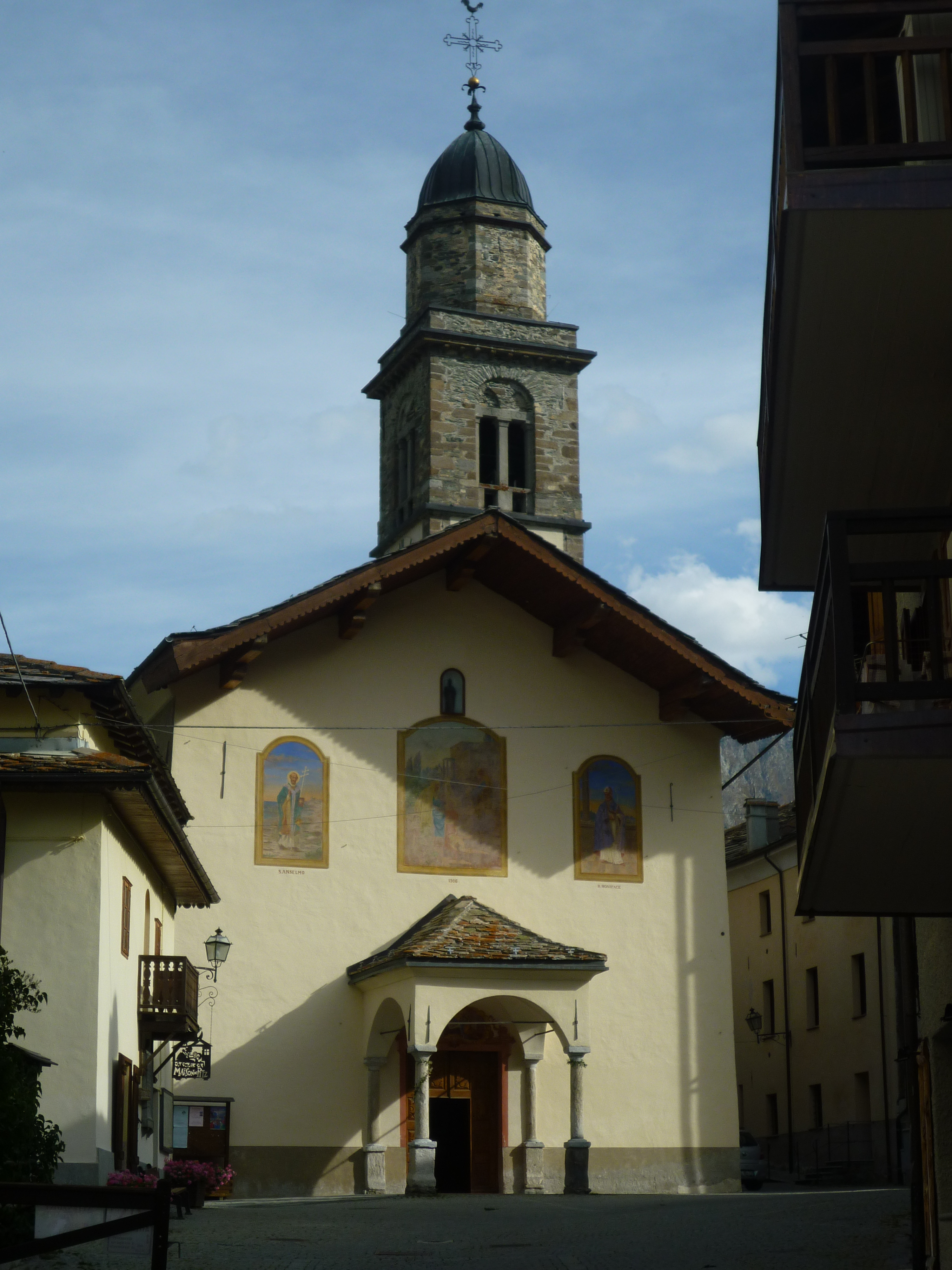 église paroissiale Saint-Ours à Cogne (Vallée d'Aoste)